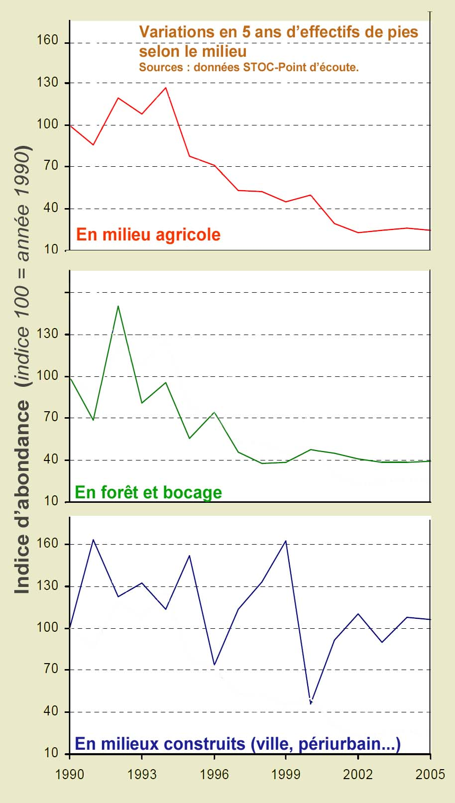 Variations sur 5 ans des effectifs français de pies (Pica pica) par type de contexte (environnement bâti, agricole et semi-naturels (forêts, bocage) (source : données STOC-point d’écoute). De 1990 à 2005, le taux de croissance annuel a été de 0.004 pour les habitats bâtis, de -0.09 pour les habitats agricoles, et de -0.06 pour les habitats semi-naturels. Pour en savoir plus, voir la thèse de François Chiron, Dynamiques spatiale et démographique de la pie bavarde Pica pica en France : implications pour la gestion ; Thèse de doctorat en écologie, du MNHN, soutenue le 23 février 2007, PDF, 322 pages en langue française